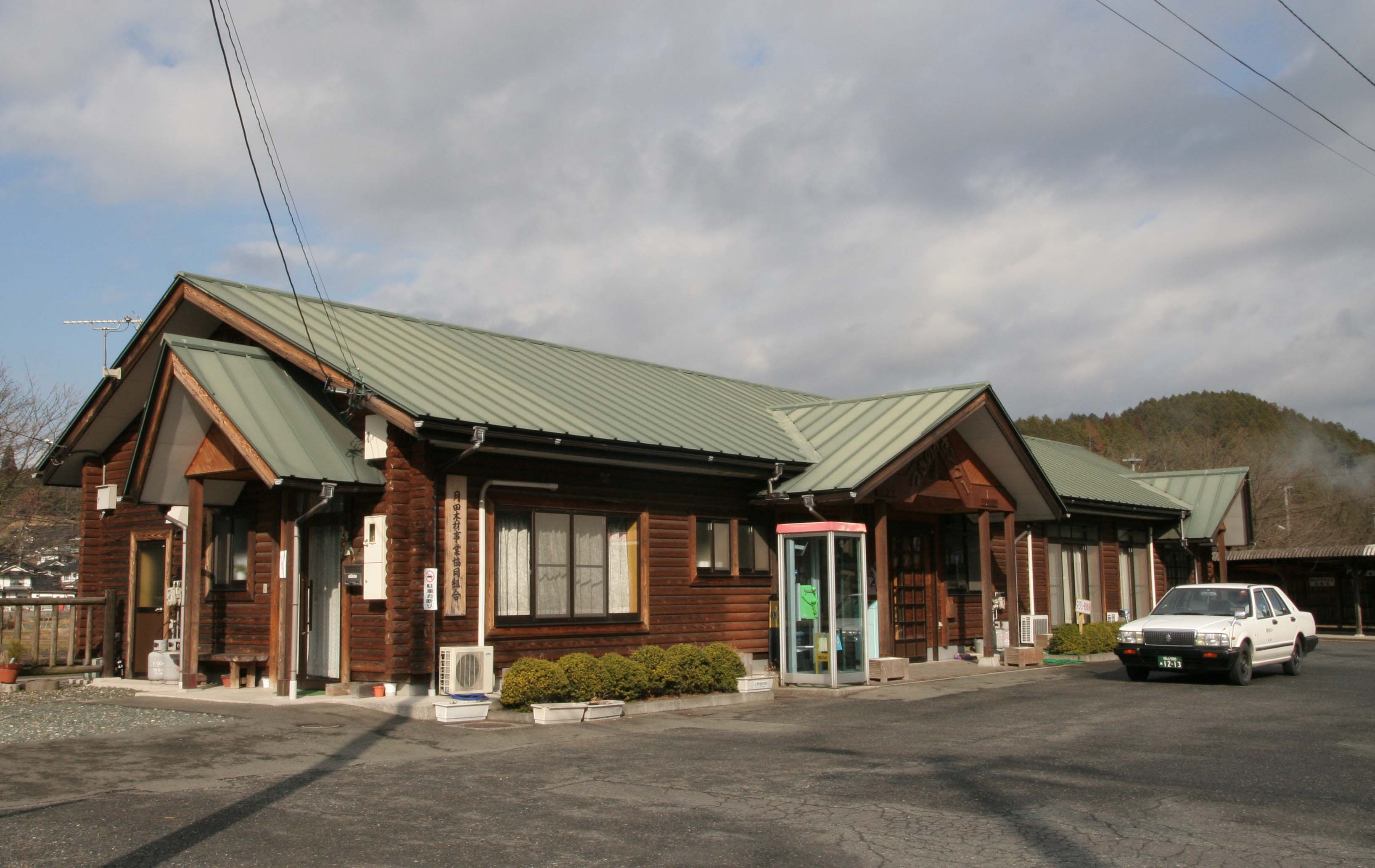 月田駅の駅舎